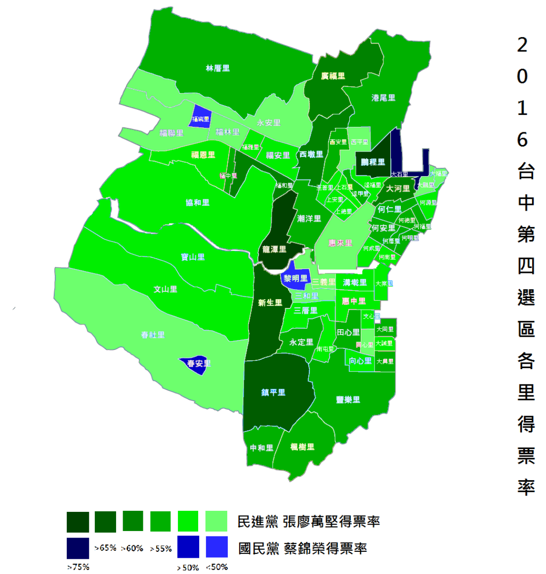 2016台中南屯西屯各里得票率